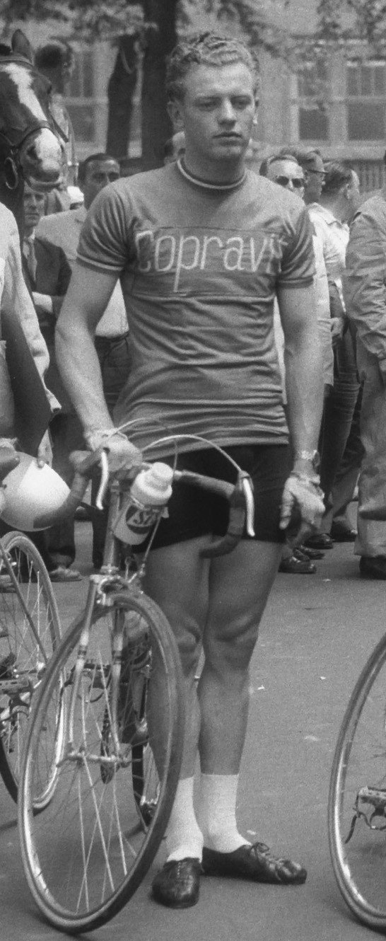 Collectie / Archief : Fotocollectie Anefo Reportage / Serie : [ onbekend ] Beschrijving : Start Ronde van Nederland op Rembrandtplein Duitse ploeg Datum : 17 juni 1958 Trefwoorden : ploegen, wielrennen Fotograaf : Pot, Harry / Anefo Auteursrechthebbende : Nationaal Archief Materiaalsoort : Negatief (zwart/wit) Nummer archiefinventaris : bekijk toegang 2.24.01.04 Bestanddeelnummer : 909-6441